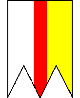 vlajka obce Čachtice